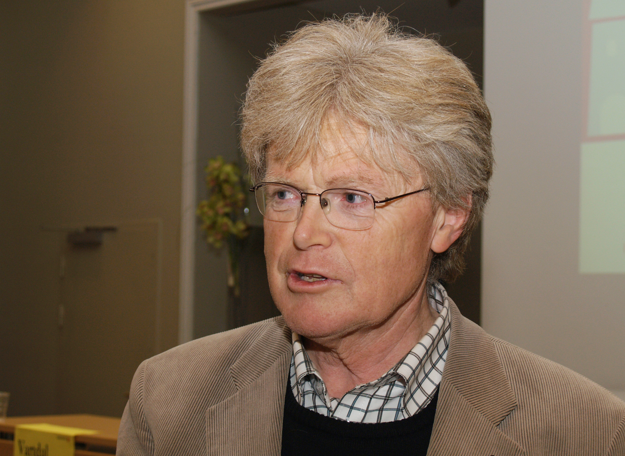 Biskop i Sør-Hålogaland, Tor Berger Jørgensen